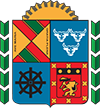 Escudo del partido de La Matanza, provincia de Buenos Aires, Argentina.